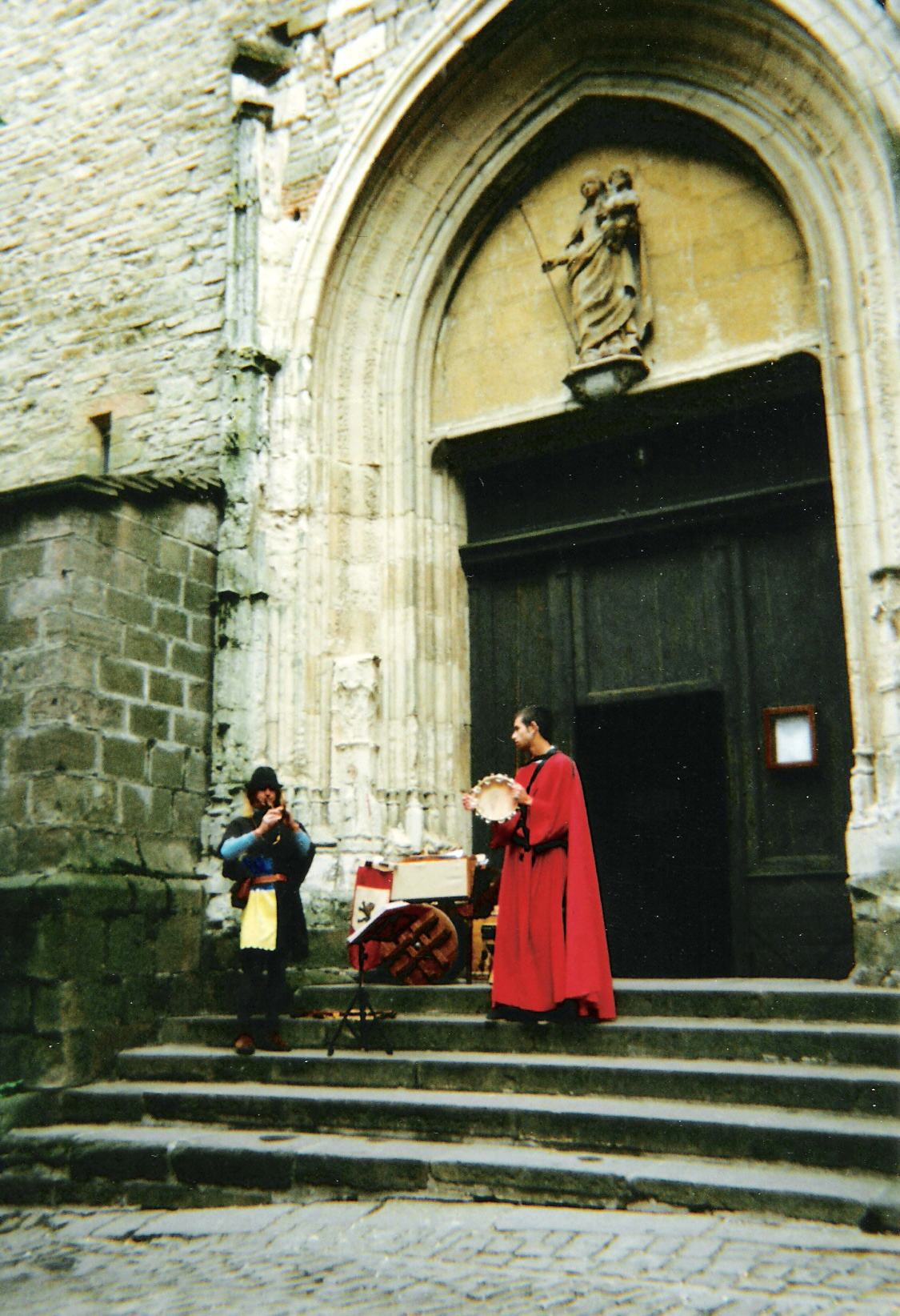 Ménestrels à l'entrée de l'église de Cordes-sur-Ciel (France, Tarn) pendant le Festival du Grand Fauconnier.